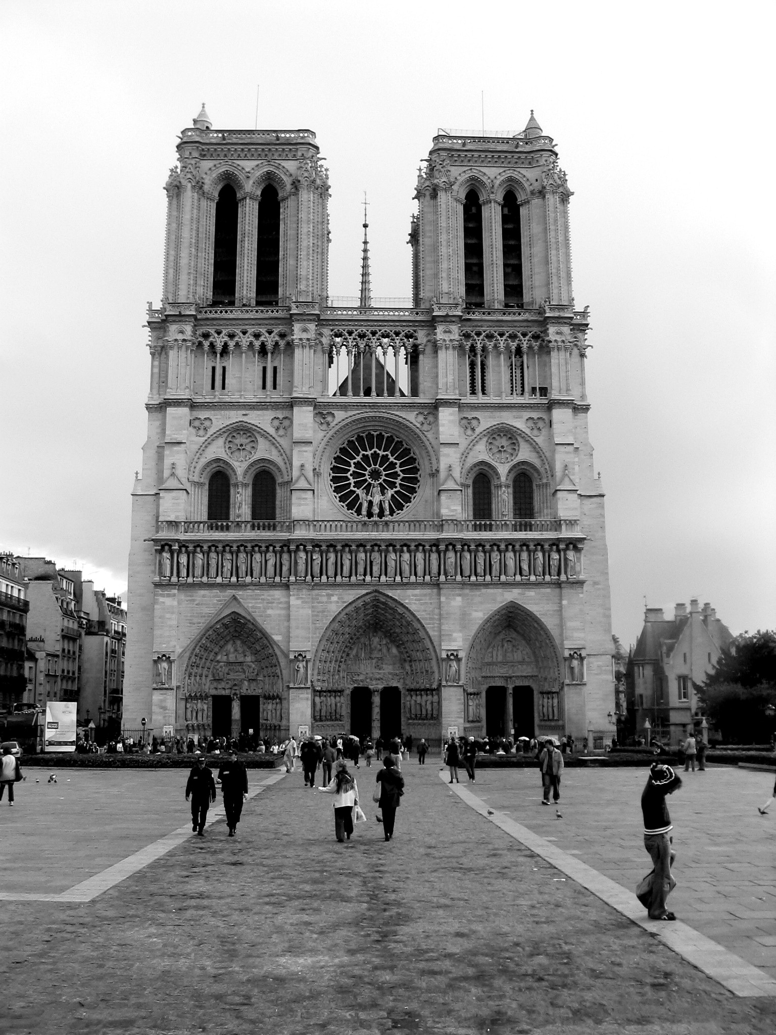 La cathédrale Notre-Dame de Paris./Cathedral Notre-Dame de Paris. Les contrastes ont été accentués. Modification of contrasts.